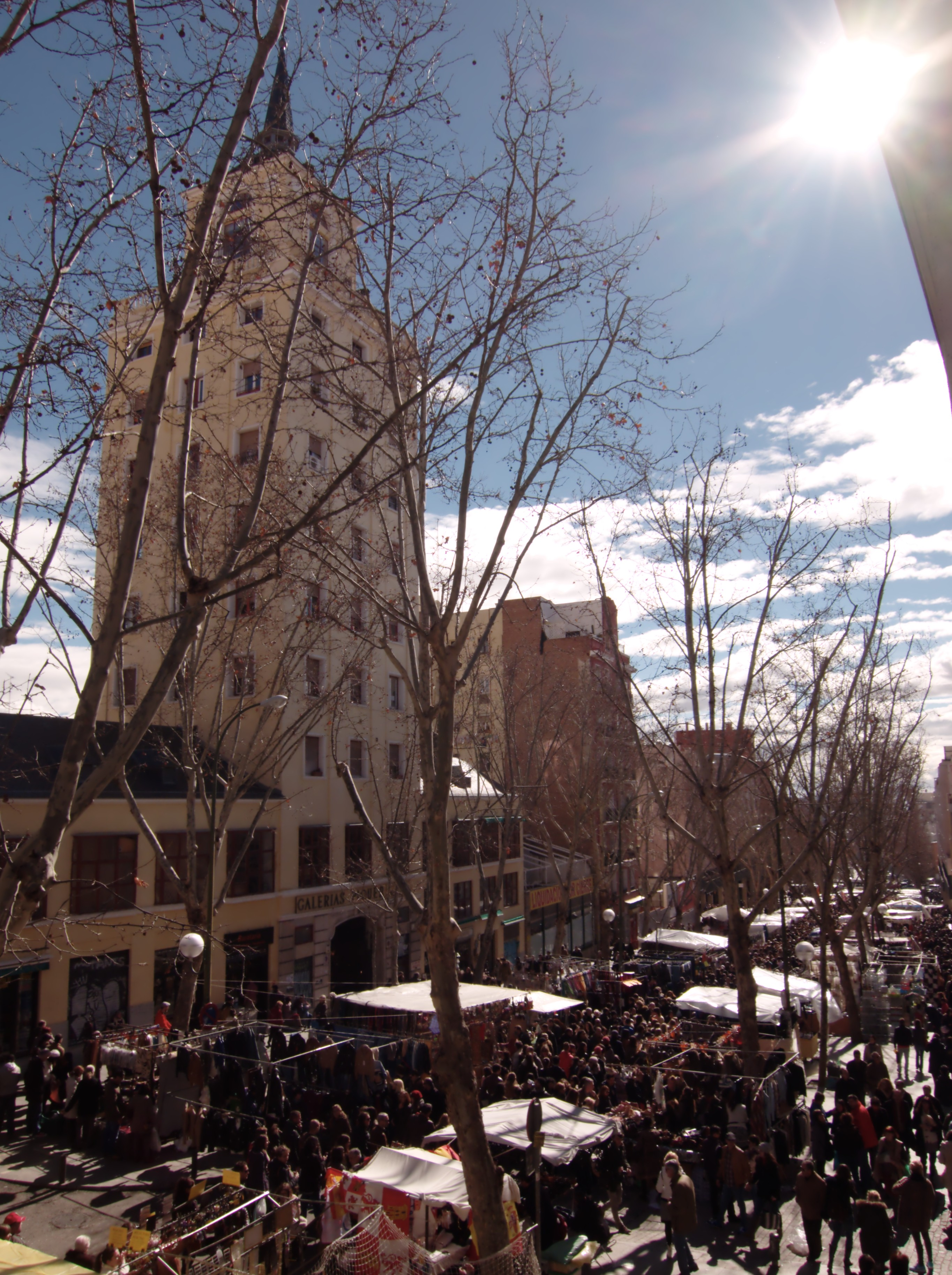 Madrid